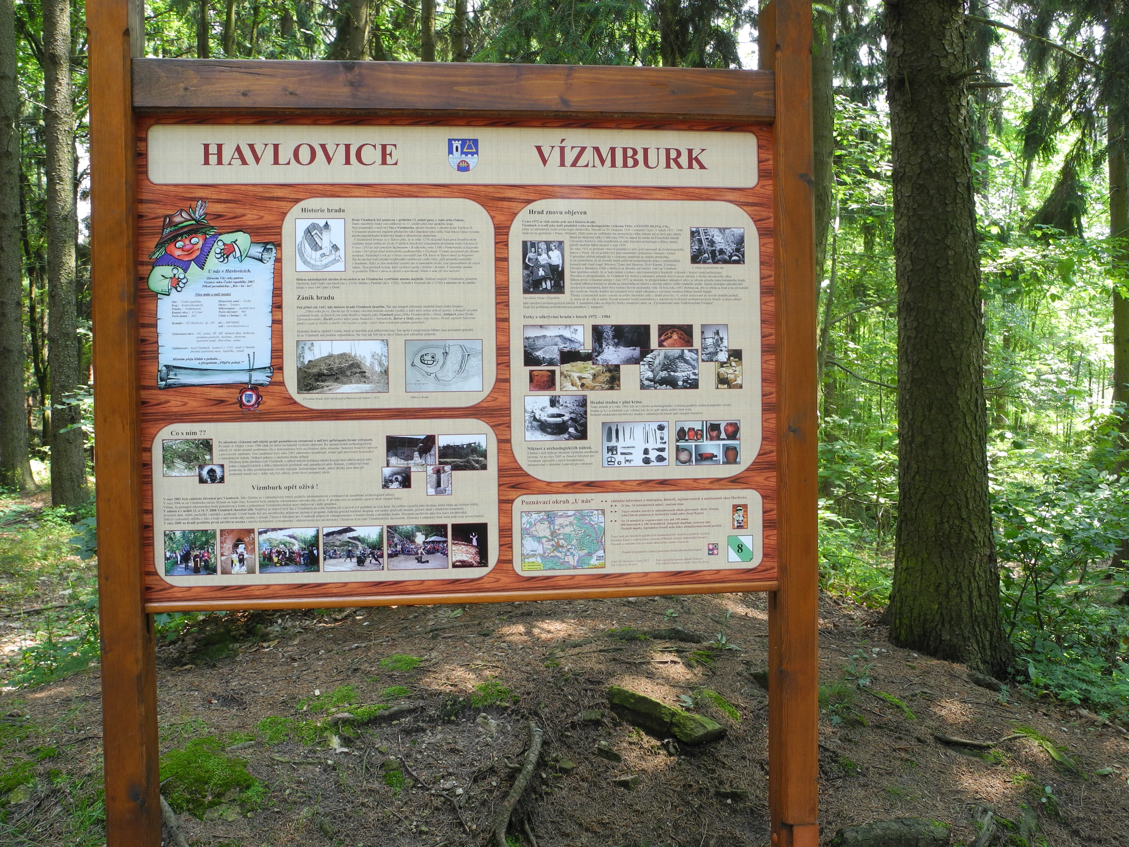 Tabule naučné stezky: "Po stopách erbu zlatého třmene"